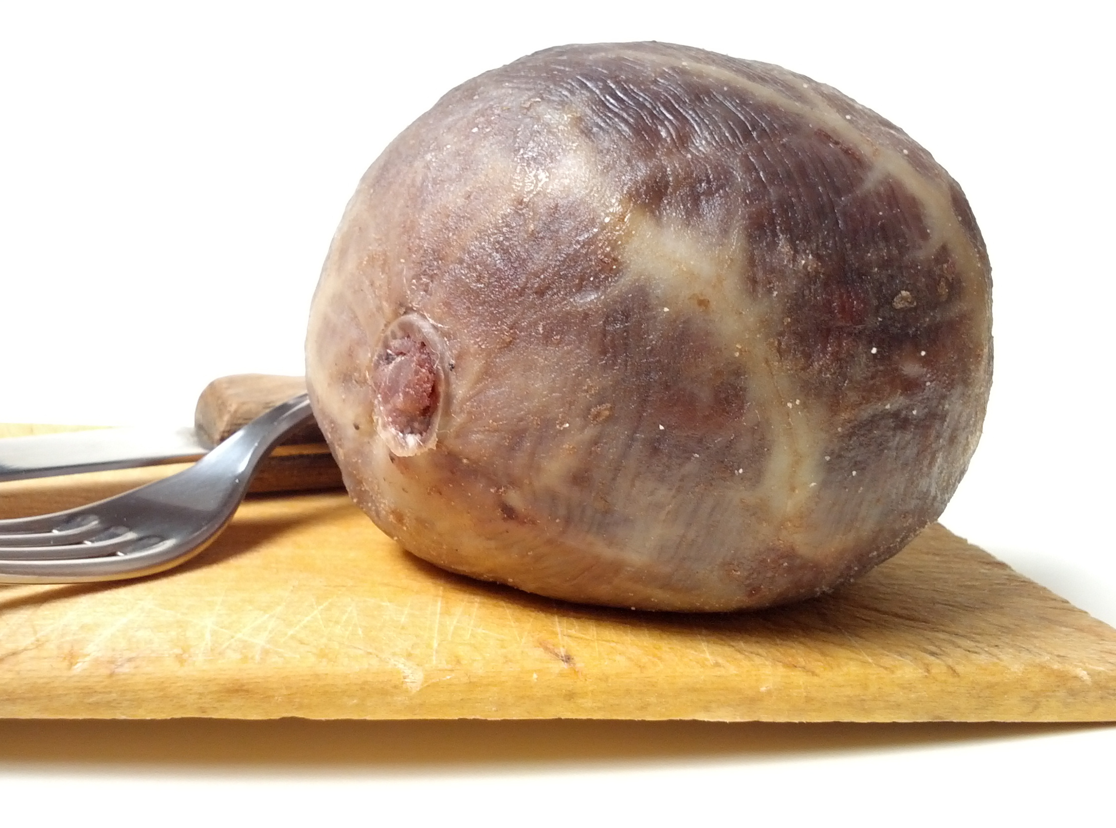 Biroldo lucchese